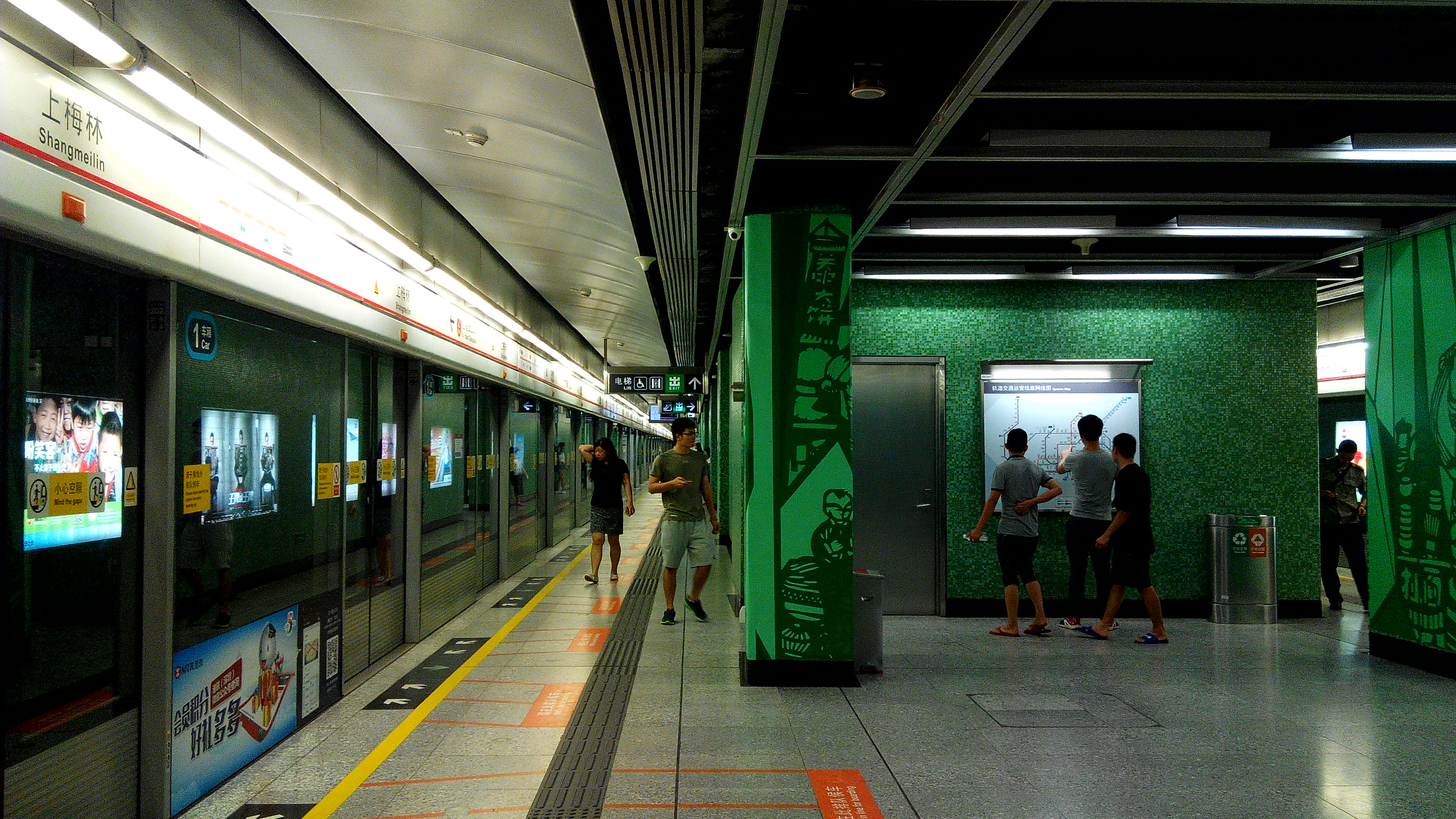 深圳地铁4号线上梅林站站台